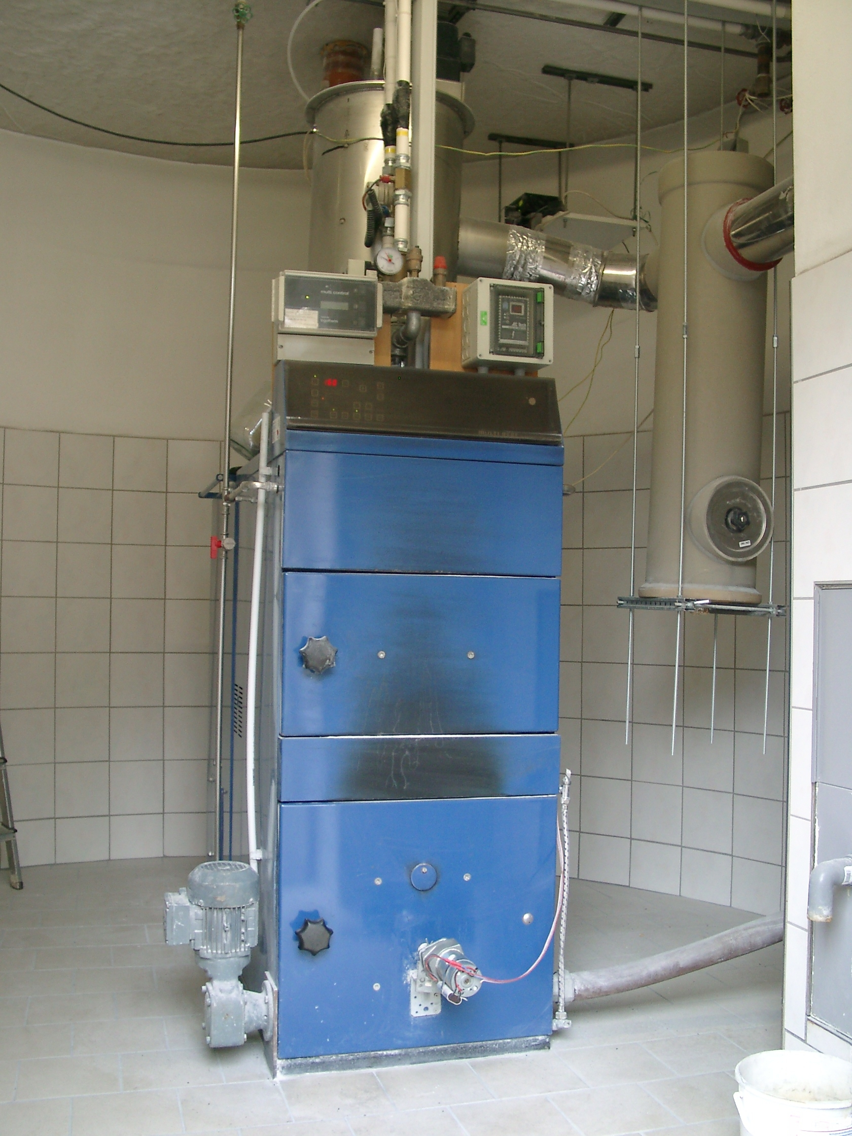 22kW BAXI-Getreideheizungskessel im Hof von Franz Pentenrieder, Starnberg